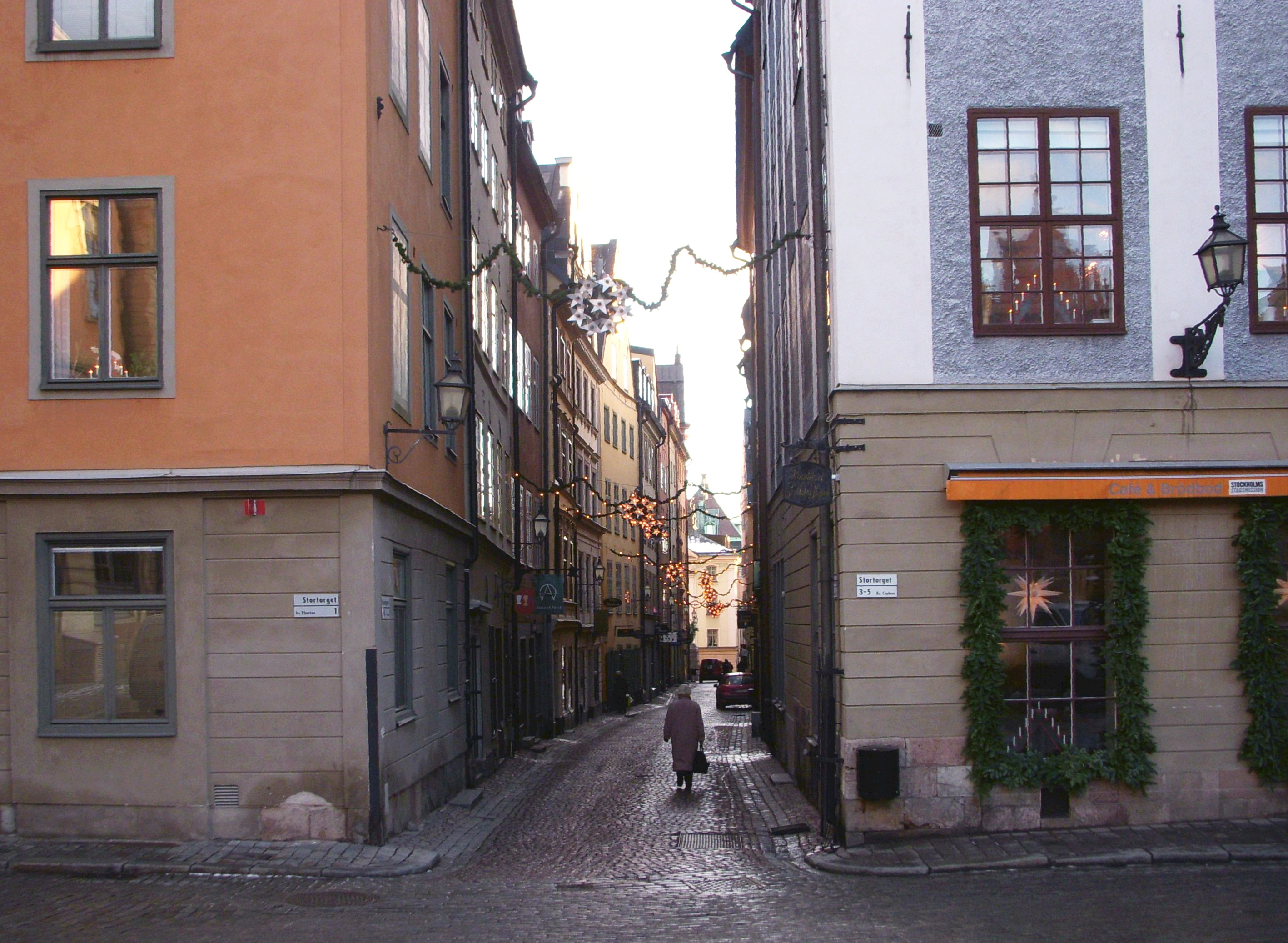 Köpmangatan i Gamla stan, Stockholm, vy från Stortorget